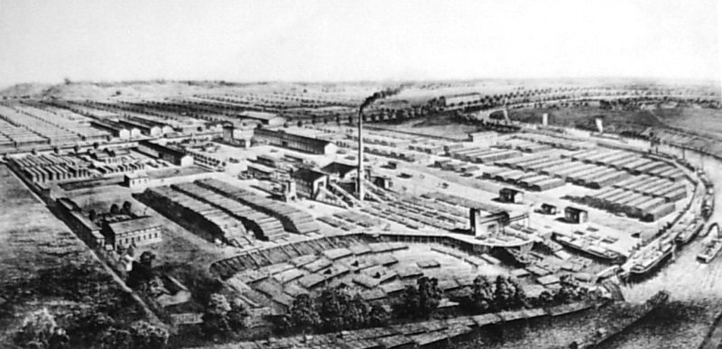 Tartak Salomona Seliga w Bydgoszczy (1891-1920)